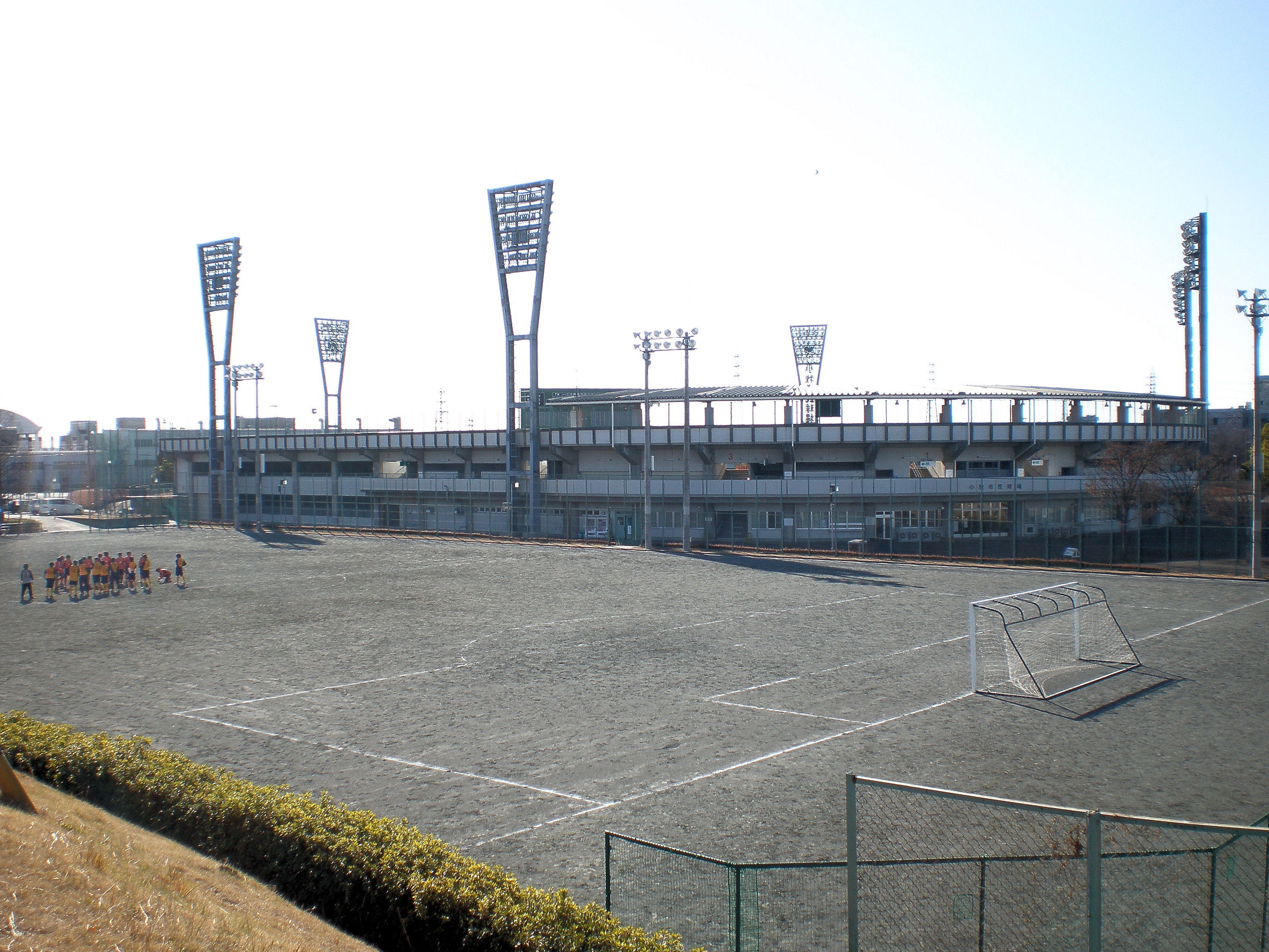 愛知県小牧市にある小牧市総合運動場